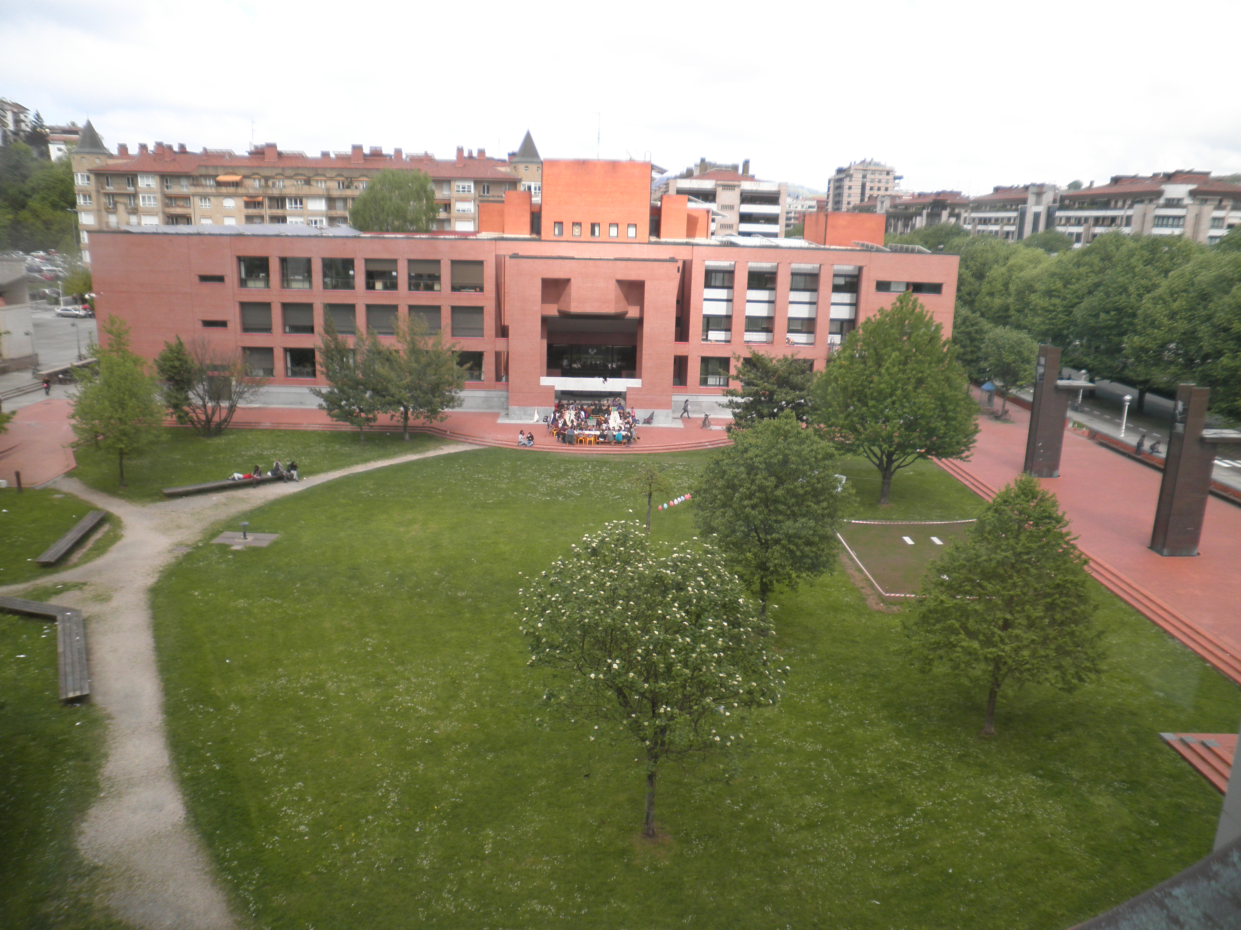 EHUko Irakasleen Unibertsitate Eskola, Donostian. Ikasleak bazkaltzen, sarreran.